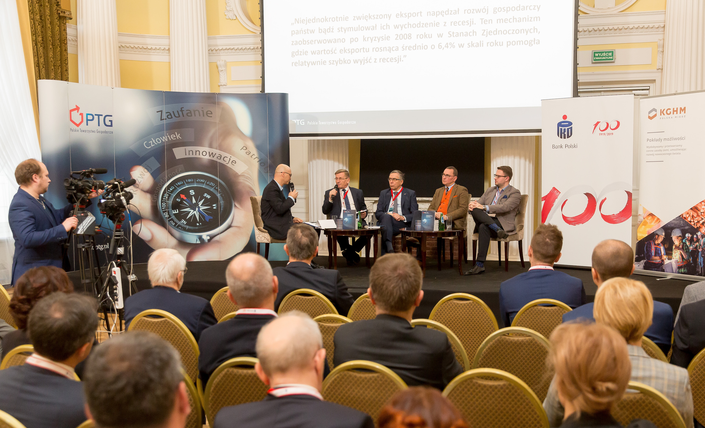 PTG panel